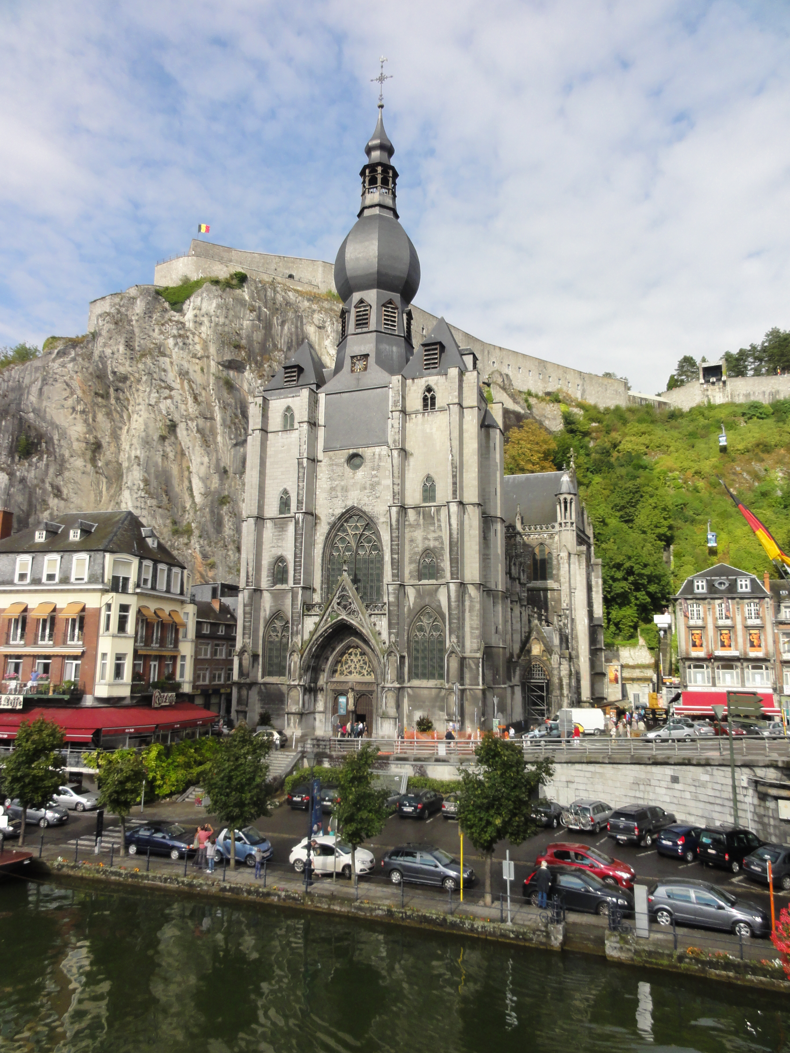 Collégiale Notre-Dame de Dinant.